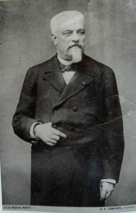 Général Hippolyte Sebert (1839-1930)